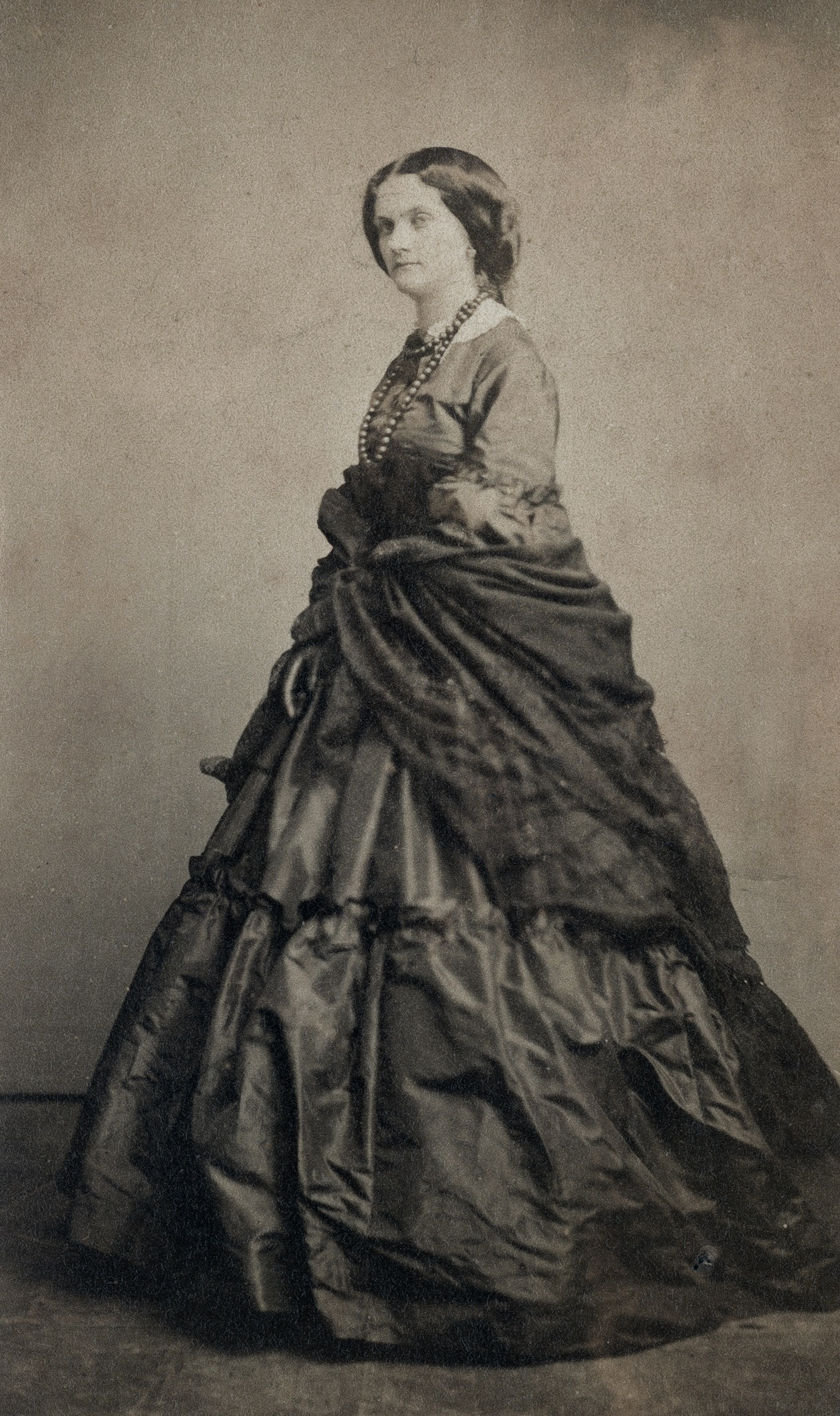 Anna Hedwig von der Decken born von Kleist 1829-1920